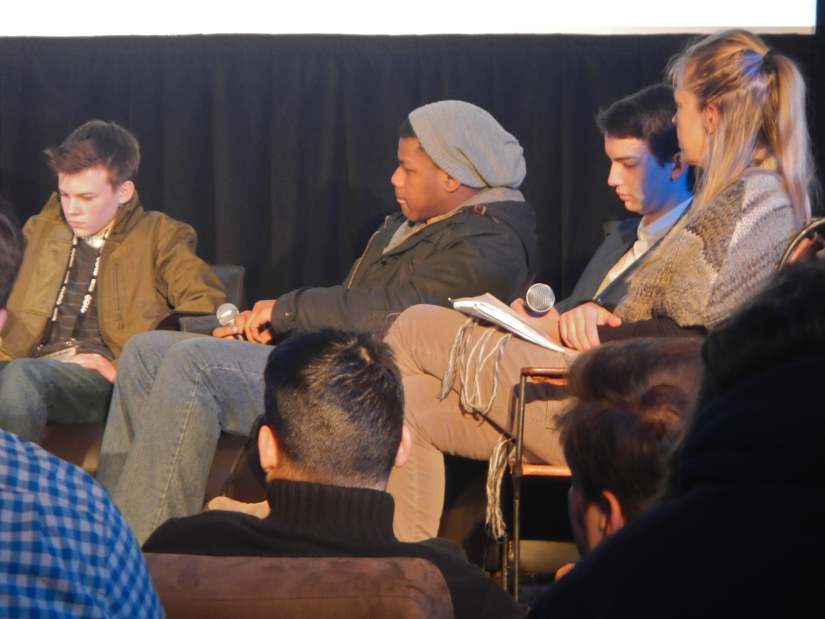 Sundance 2014 Cinema Cafe